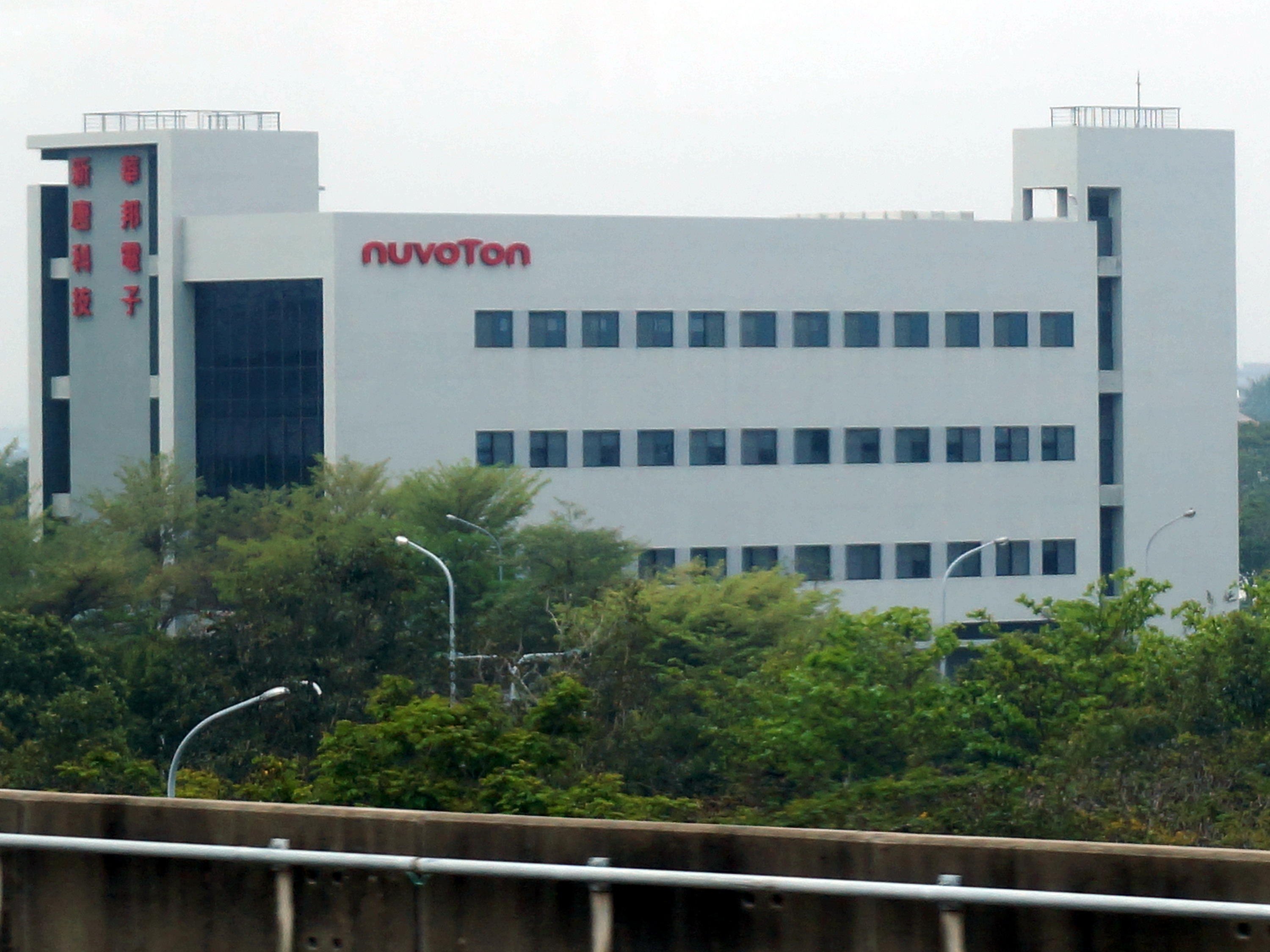 新唐科技台南辦事處，地址：臺南市歸仁區武當路111號。於台灣高鐵南下列車上拍攝。